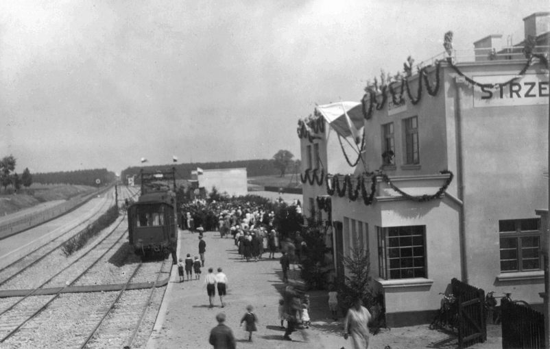 Otwarcie strzebińskiego dworca kolejowego ok. 1939